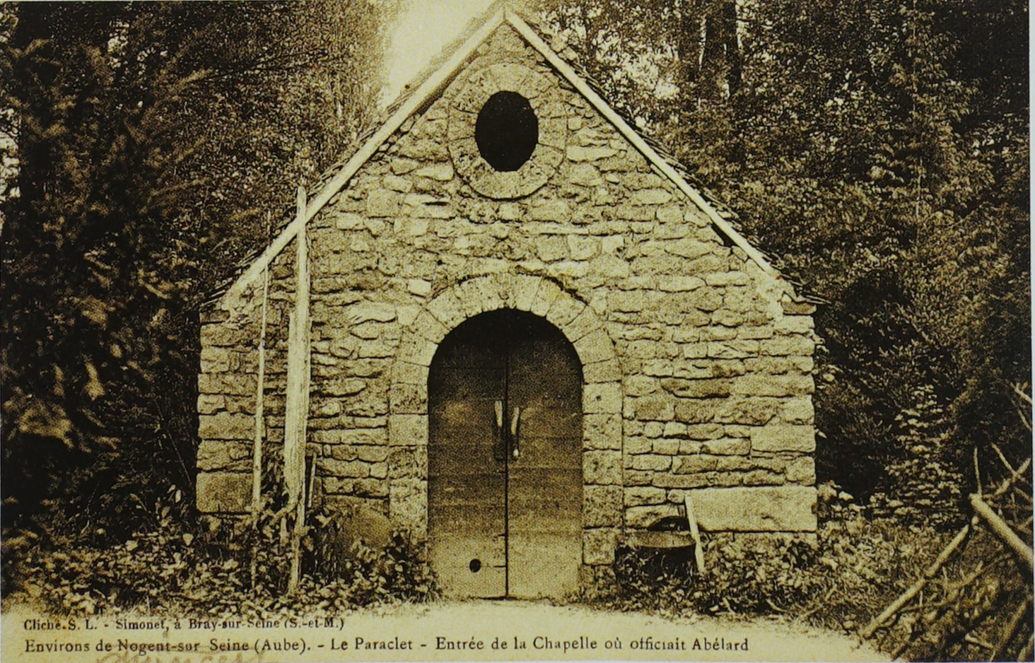 vue du paraclet